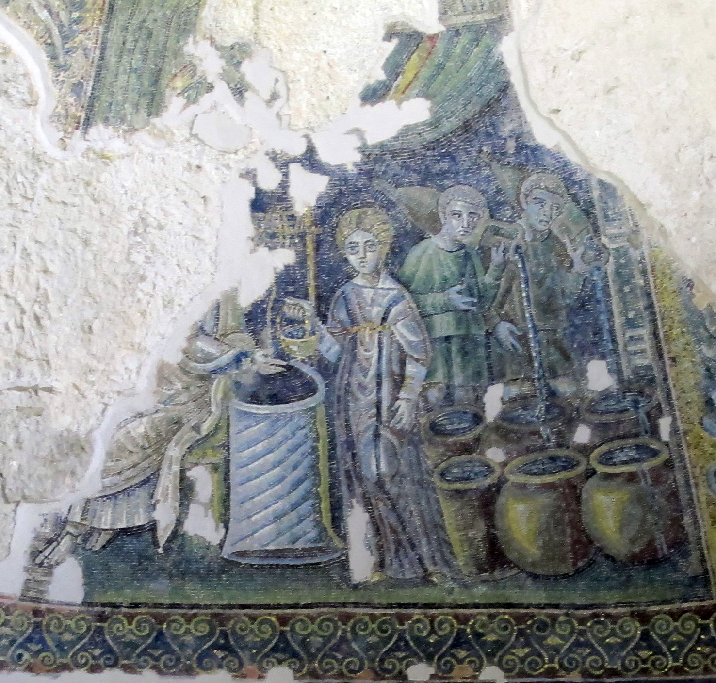 Battistero di San Giovanni in Fonte (Napoli)